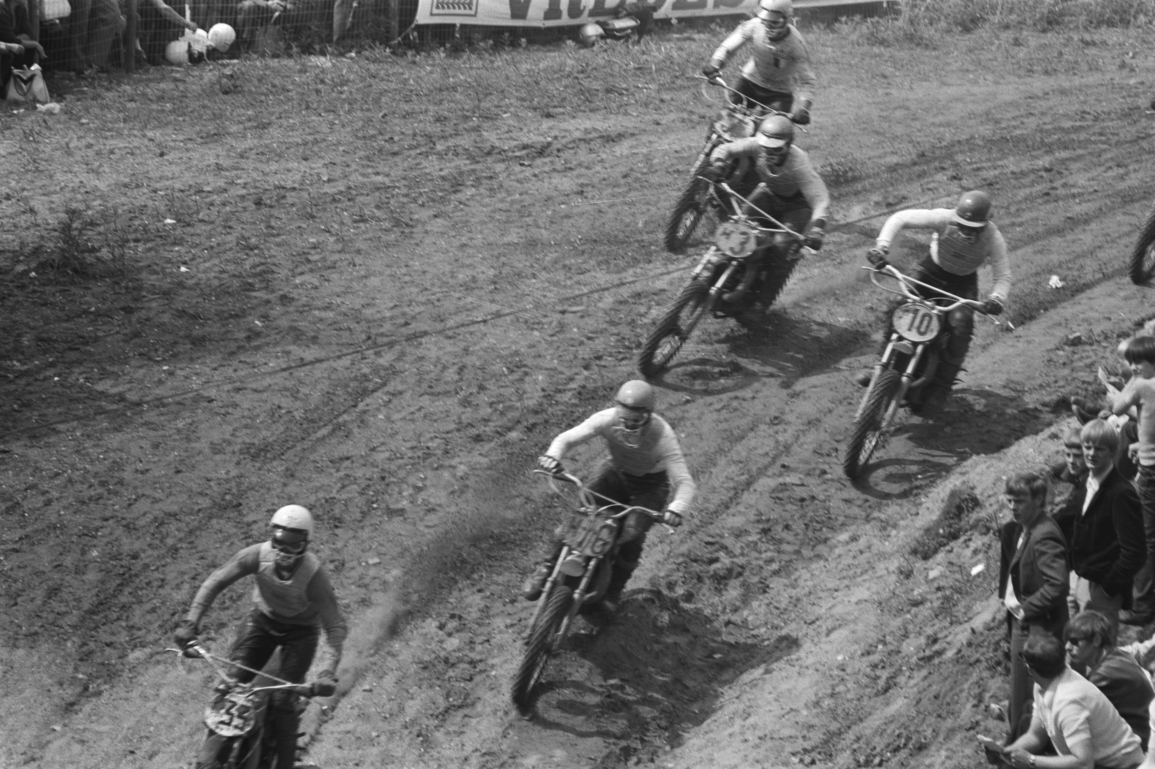 Collectie / Archief : Fotocollectie Anefo Reportage / Serie : Internationale motorcross op de Grebbeberg bij Rhenen Beschrijving : In actie tijdens de cross Datum : 20 mei 1971 Locatie : Grebbeberg, Rhenen, Utrecht (provincie) Trefwoorden : helmen, motorcross, motorfietsen, motorsport, sport Fotograaf : Fotograaf Onbekend / Anefo Auteursrechthebbende : Nationaal Archief Materiaalsoort : Negatief (zwart/wit) Nummer archiefinventaris : bekijk toegang 2.24.01.05 Bestanddeelnummer : 924-5721 Reacties Geplaatst door wieb van de pol op 26 mei 2011 - 20:46. H33 pierre karsmakers,10 is wiebe plotz,H3 is ton van heugten,H16 is jan keizer